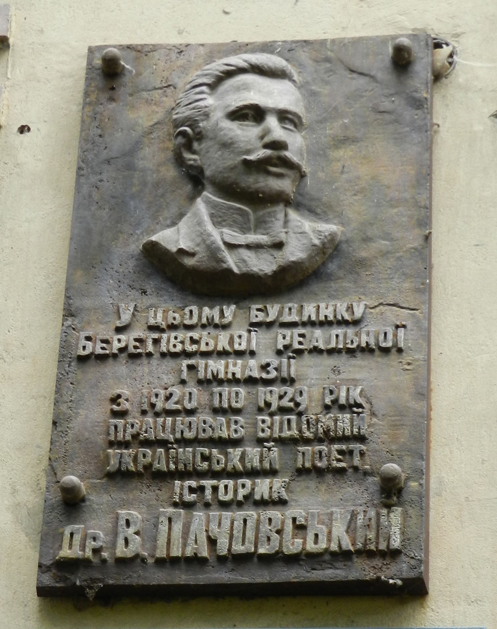 Меморіяльна табличка на честь В. Пачовського